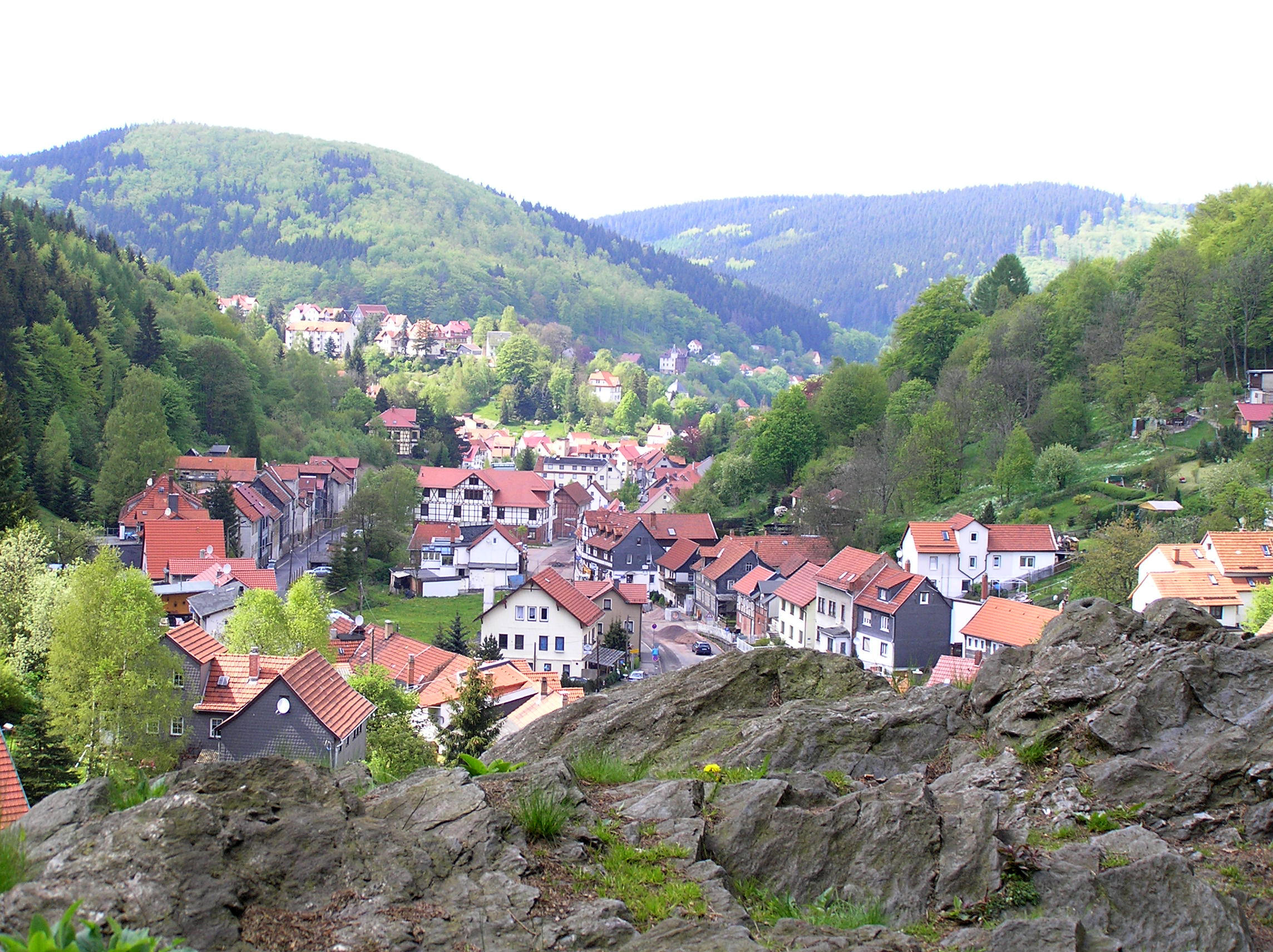 Blick vom Mühlrainstein im oberen Ortsteil Ruhla